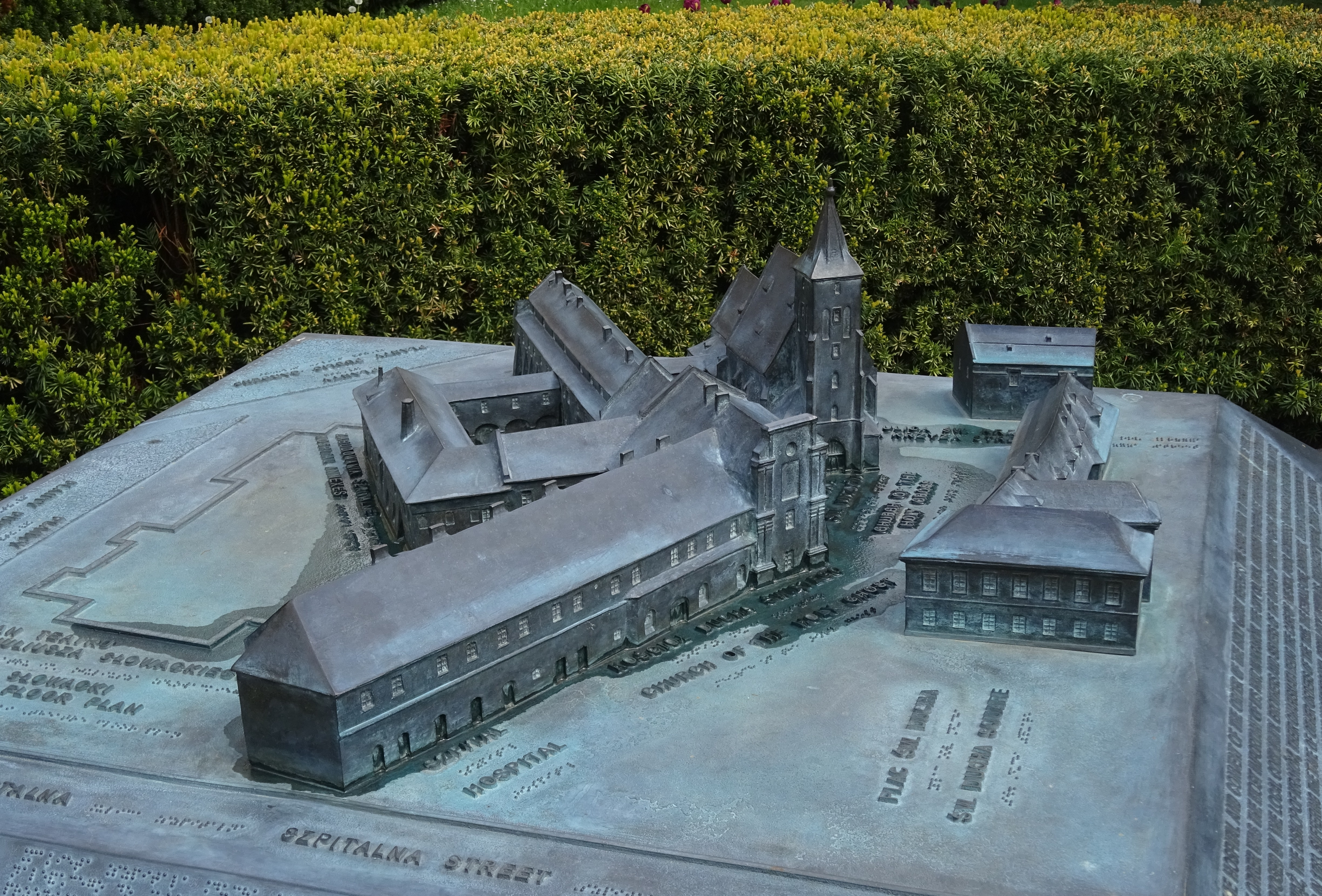 Kościół Ducha Świętego i zabudowania szpitala - nieistniejące, wraz z istniejącym Kościołem św. Krzyża. Model znajdujący się na placu św. Ducha, w sąsiedztwie Teatru im. Juliusza Słowackiego w Krakowie.